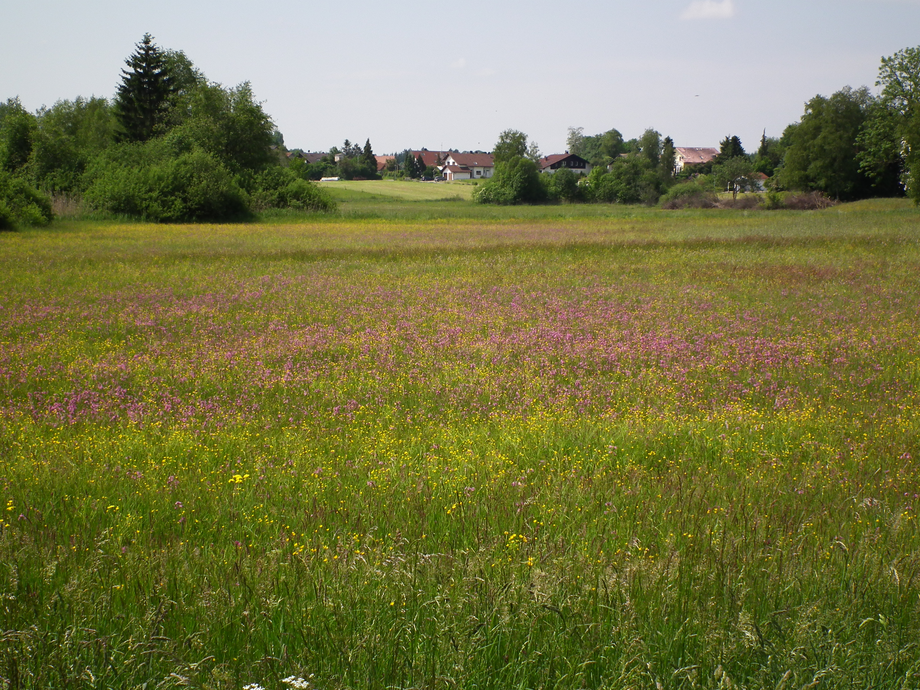 Kißlegg (Baden-Württemberg, Deutschland); Blick von der Sankt-Anna-Straße nach Südsüdwest, Grünland im Naturschutzgebiet „Zeller See“, Häuser im Hintergrund an der Seestraße